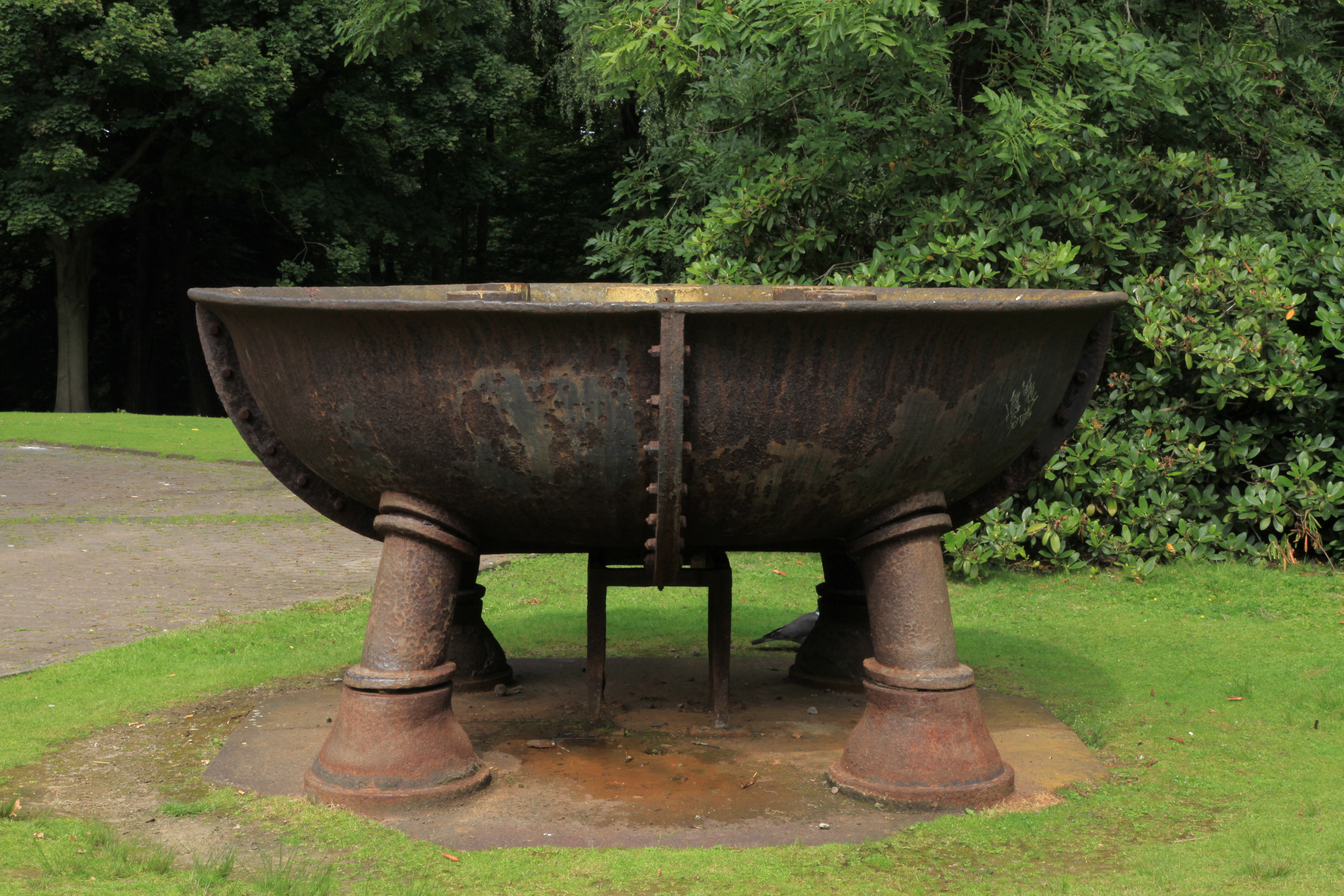 Bismarckturm an der Klinikstraße in Bochum